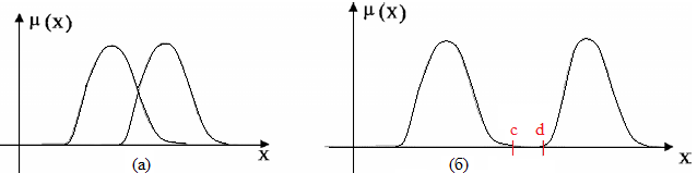 рисунок 2